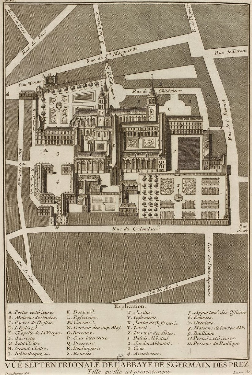 Saint-Germain-des-Près en 1724 - Jacques Bouillart, Histoire de l'abbaye royale de Saint-Germain-des-Prez, 1724, planche 2